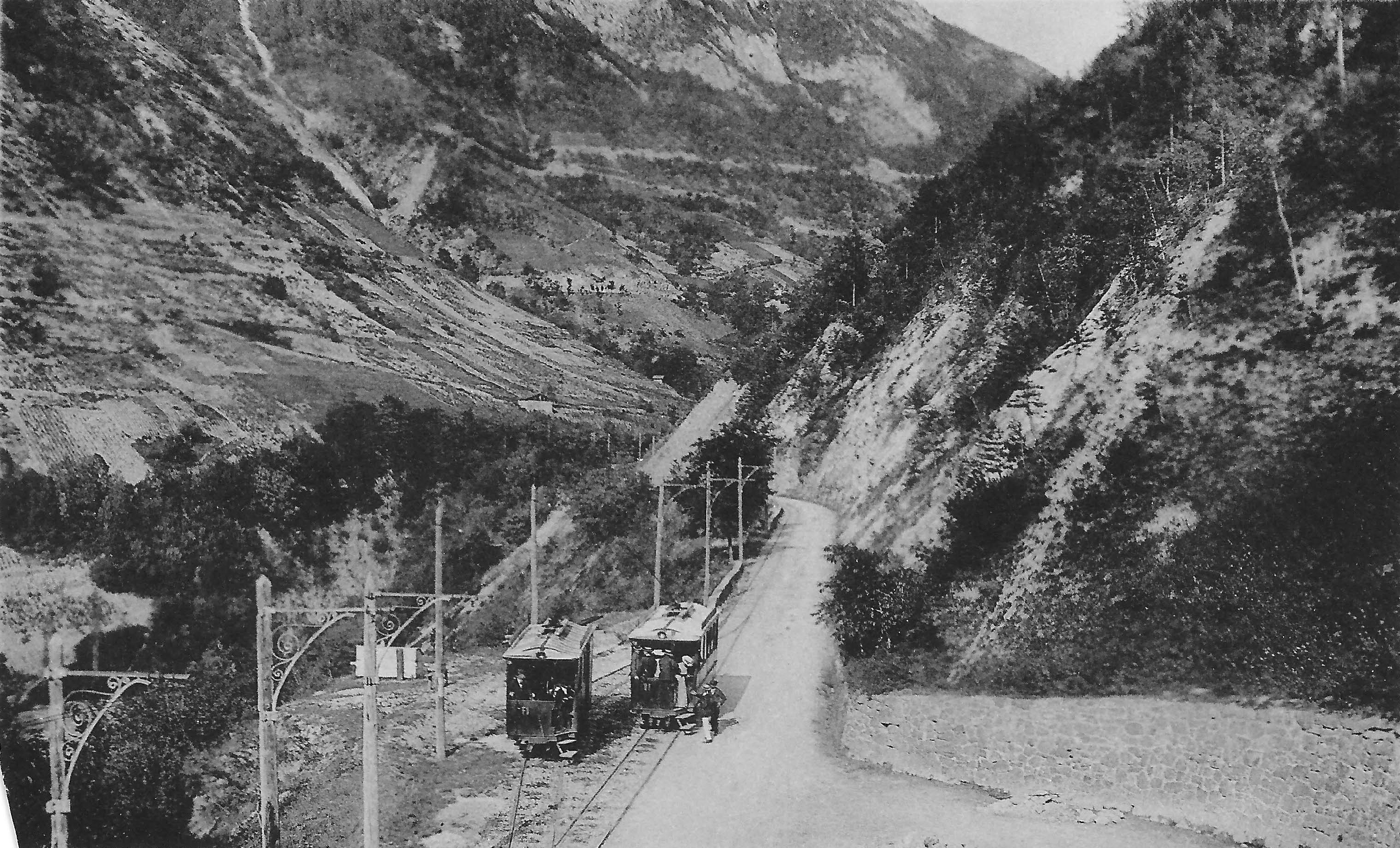 Twee kruisende tram op de tramlijn Moutiers - Brides-les-Bains